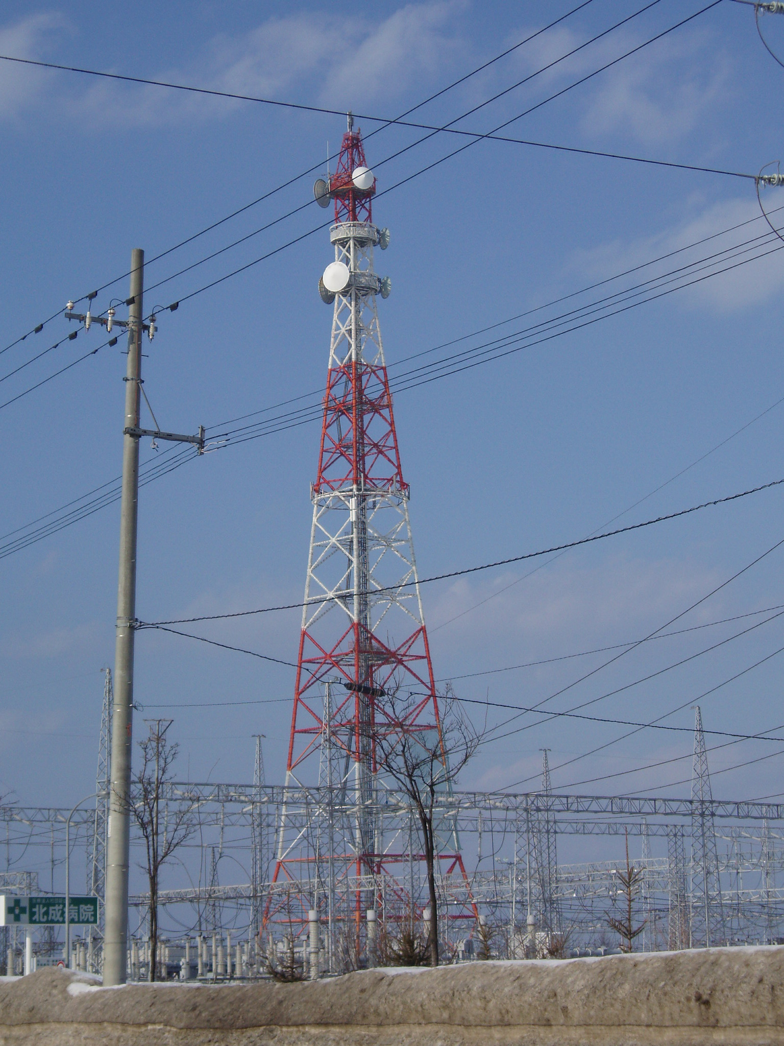 宮の沢中継局